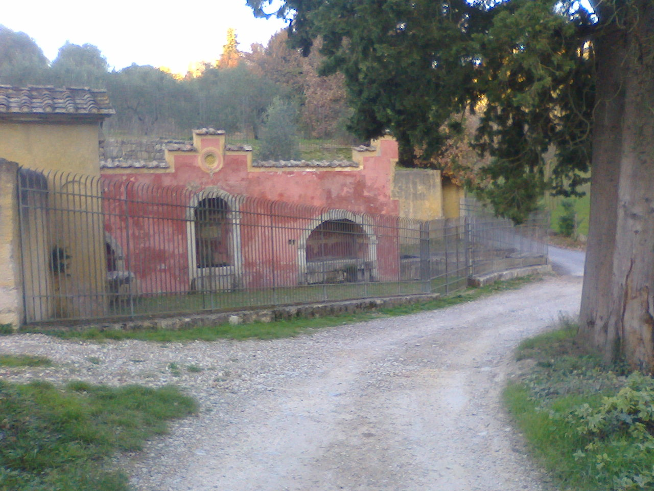 Fonte della Fata Morgana vista da Via dell'Ucellarone.